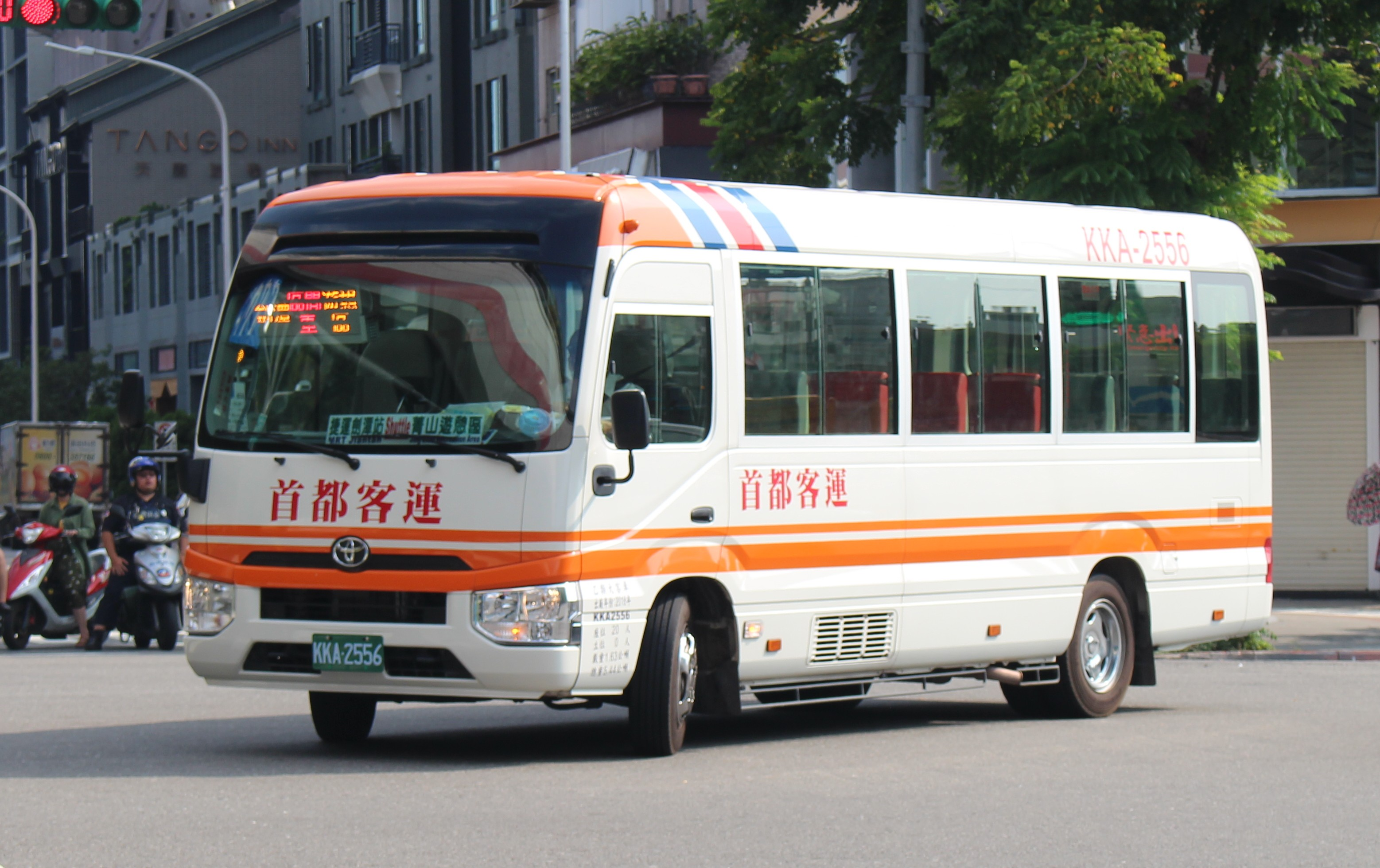 首都客運KKA-2556 小15區間車